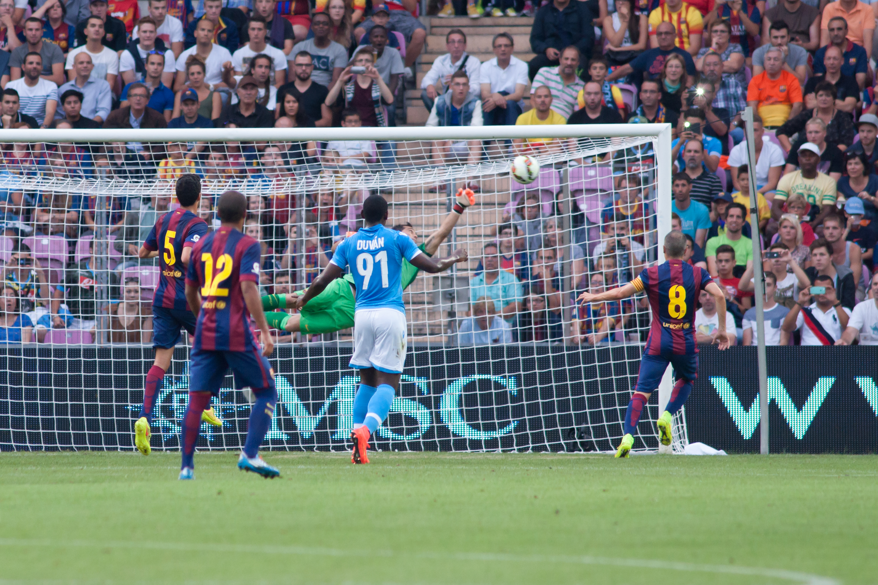 Naples vs Barcelone - Genève - aout 2014 - Andrés Iniesta